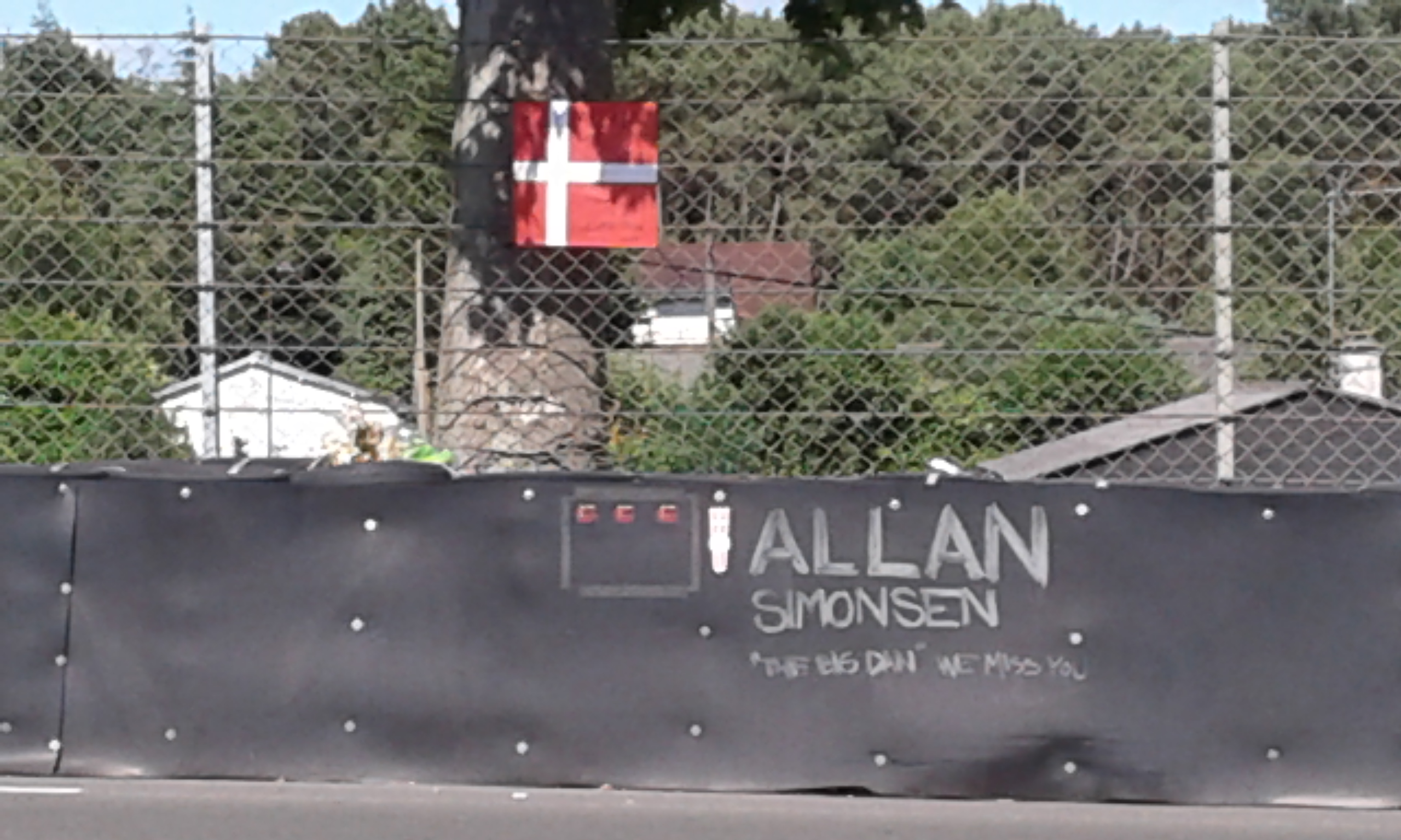 oeuvre commémorative Allan Simonsen sur le circuit du Mans